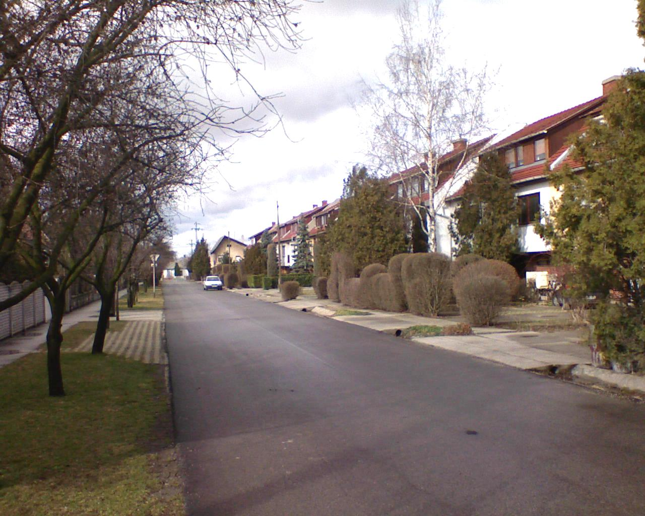 Én készítettem,közkincs.